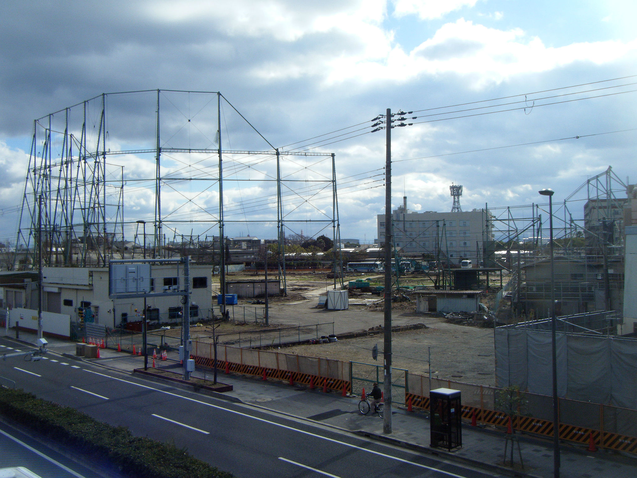 阪神浜田球場 隣接する阪神バス浜田車庫建替に伴う解体工事中。